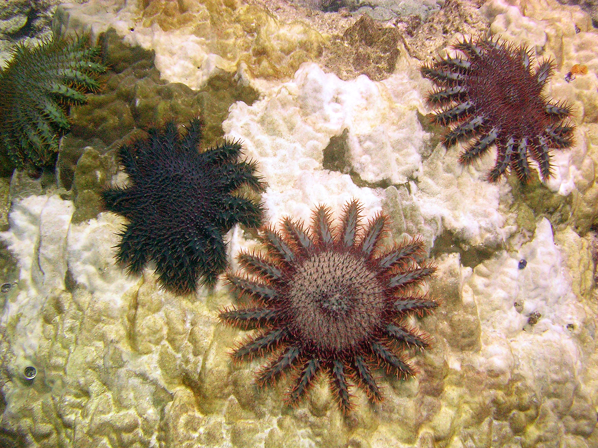 Contamination du lagon de Rurutu (Polynésie française) par les étoiles dévoreuses de corail : Acanthaster planci (Taremea en tahitien)